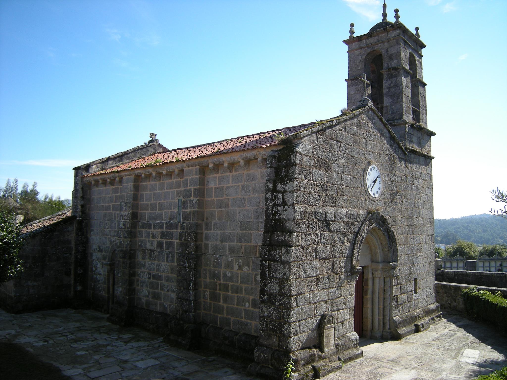 Iglesia de San Xulián de Romai - Portas - Pontevedra